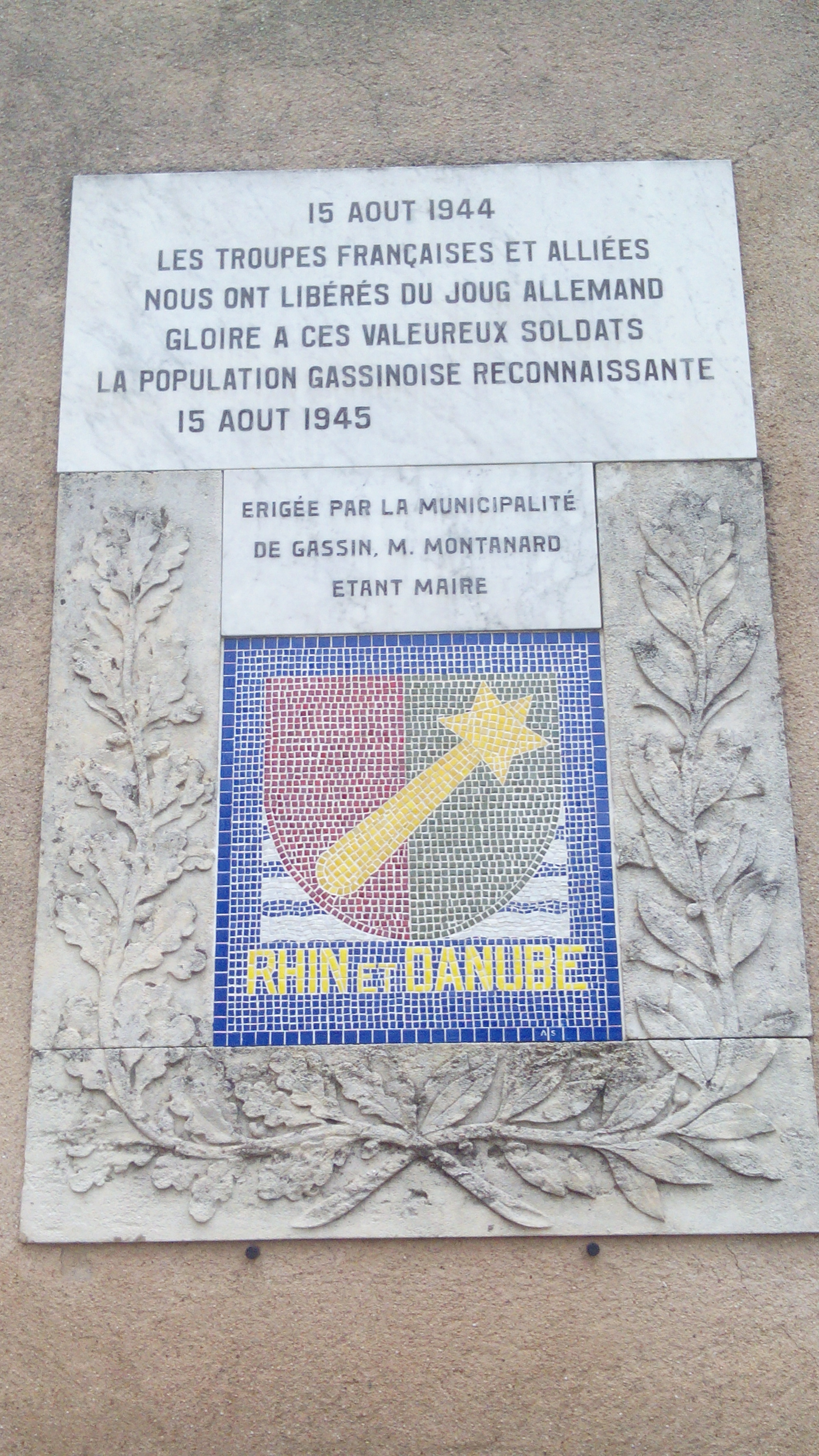 15 août 1944 les troupes françaises et alliées nous ont libérés du joug allemand gloire à ces valeureux soldats la population gassinoise reconnaissante 15 août 1945 érigée par la municipalité de Gassin, M. Montanard étant maire